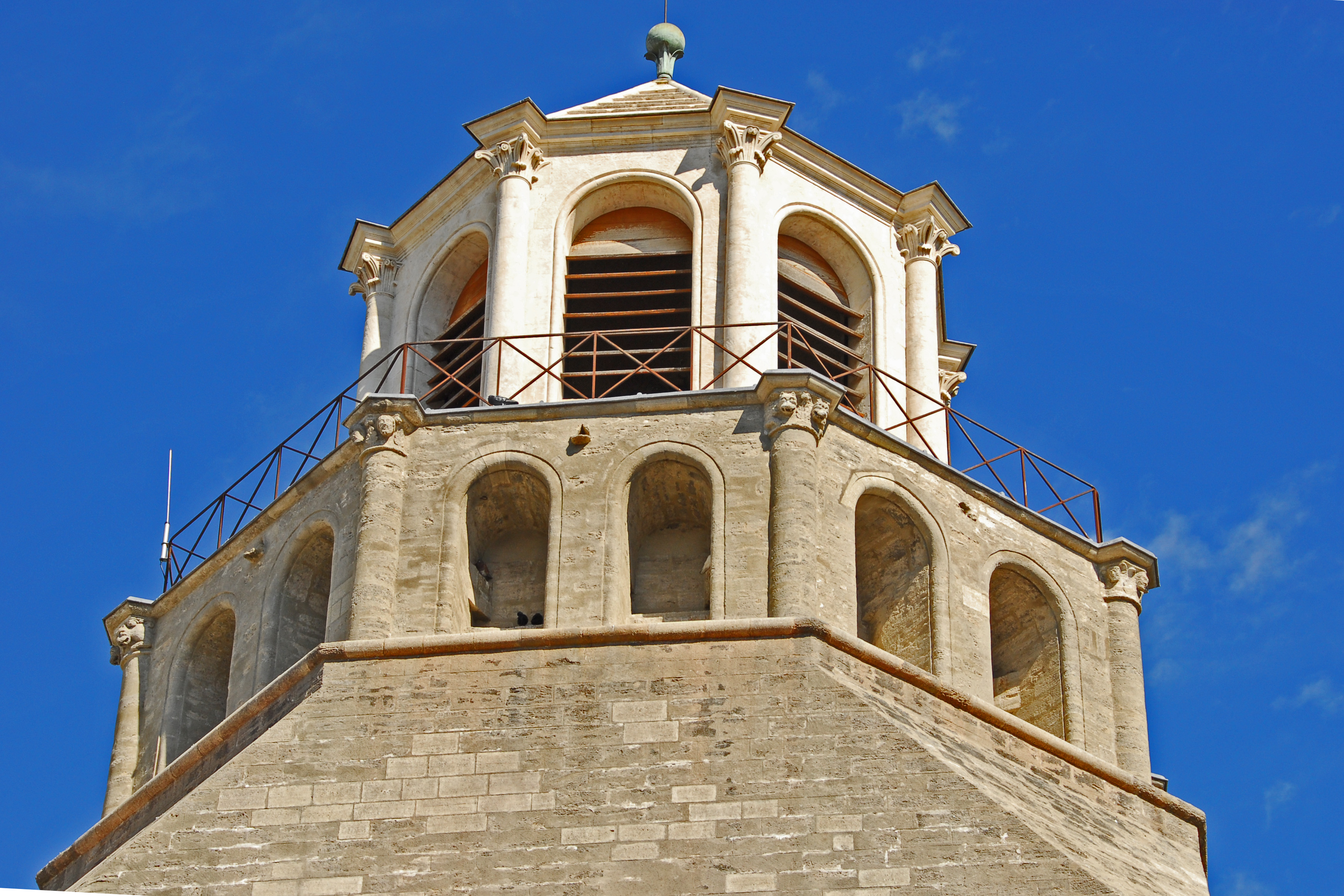 N-D-du-Lac du Le Thor, Glockenturm von Ost